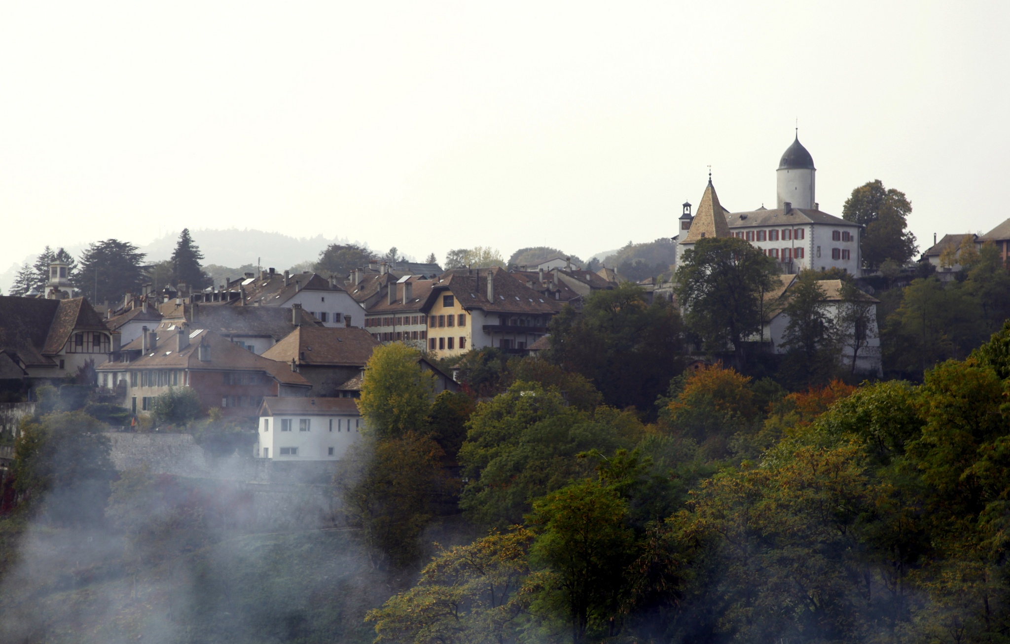 Photos pour wikilovesmonuments.ch